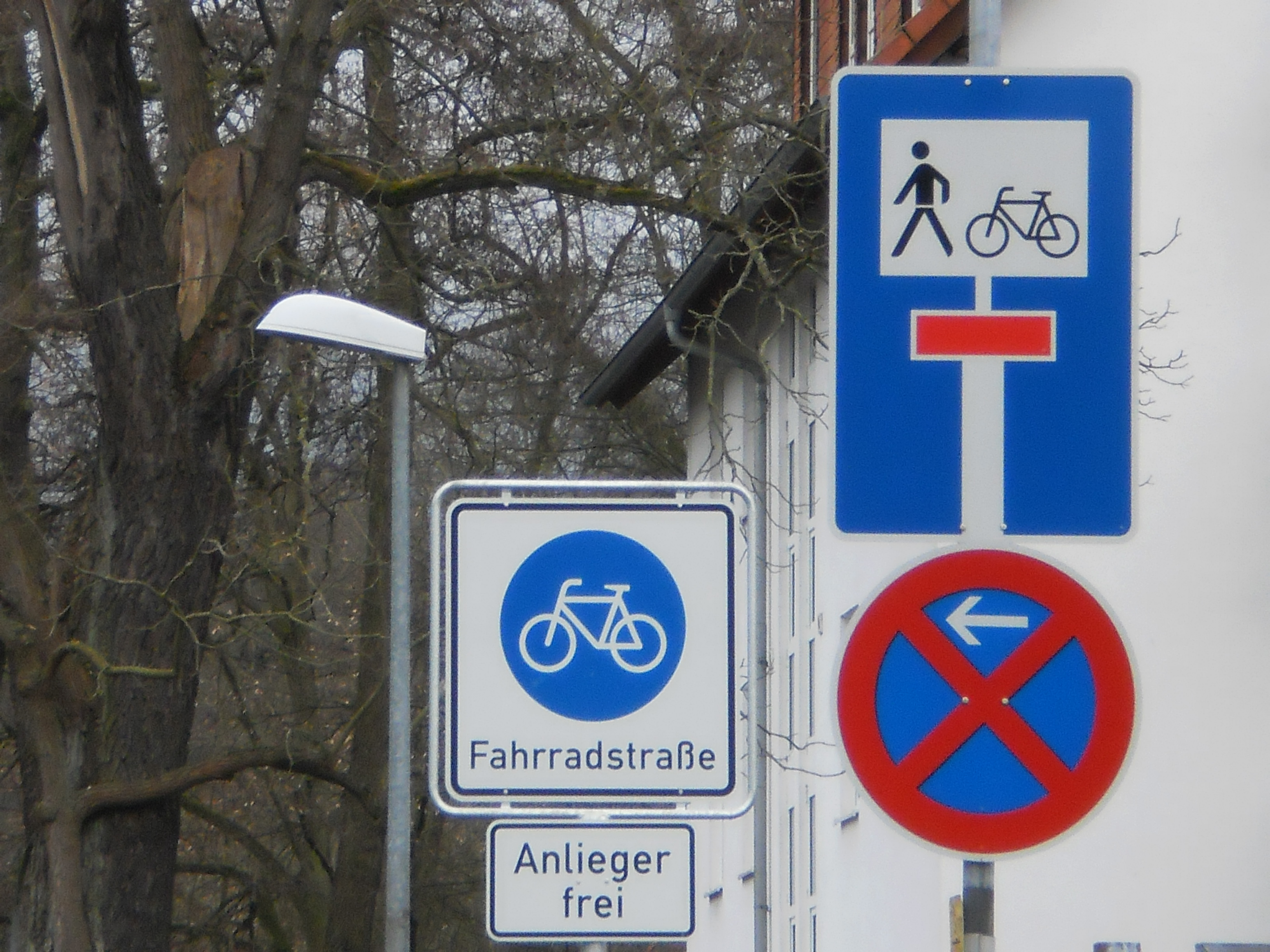 Die im März 2016 für den Radverkehr freigegebene Fahrradstrasse 'Auf der Weide' in Marburg (Bicycle boulevard), jetzt mit Zeichen 244, StVO und Zeichen 357-50 als eine geöffnete Radroute statt der vormaligen Sackgasse beschildert (der alte Fussgängersteg über die Lahn war mit 1,5 Metern Breite eigentlich zu schmal für's Fahrradfahren, doch es gab neben der viel von Autos befahrenen Hauptstrasse über die Weidenhäuser Brücke etwas weiter nördlich keine Alternative zu dieser Route zwischen Südviertel und Weidenhausen über die Lahn). Zudem ist der zur Herstellung der Durchlässigkeit der ehemaligen Sackgasse für die Flussüberquerung neugebaute Hirsefeldsteg (← de-Wikipedia-Artikel) ein wichtiger Zubringer zum Lahntalradweg. Die Verkehrszeichen stehen am Beginn der Fahrradstrasse in der Frankfurter Strasse und geben für Anlieger das Befahren mit KFZ frei, bei Vorrang für das Fahrradfahren.